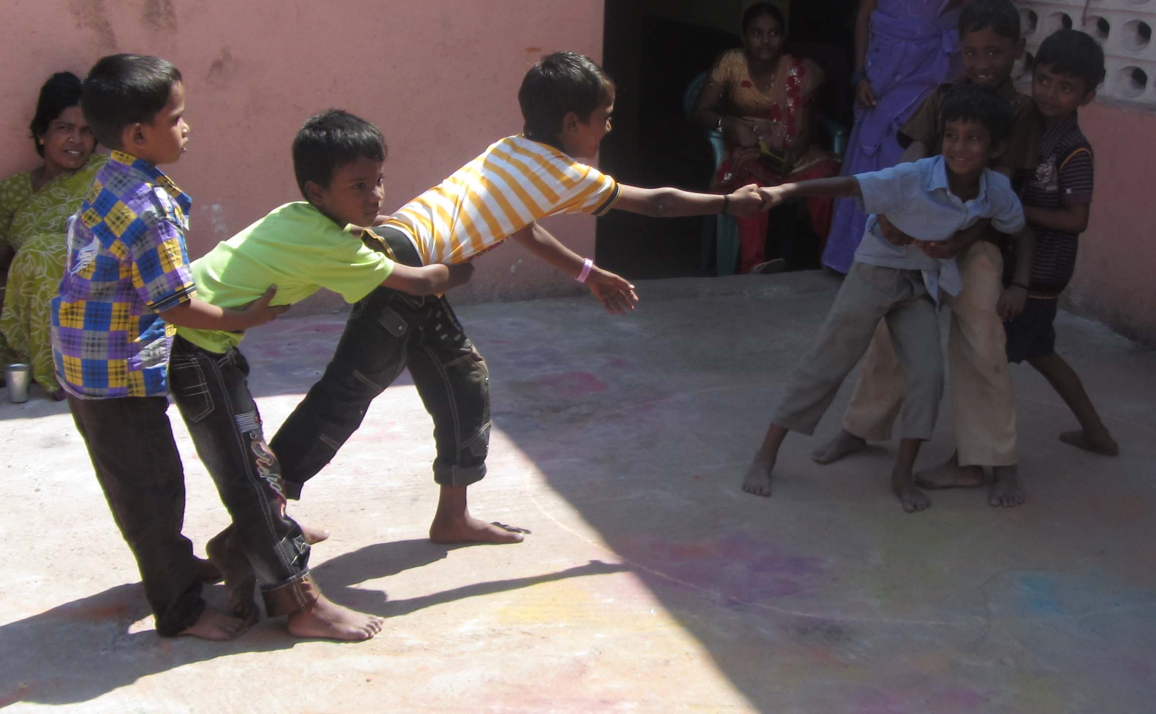 own shot - கோட்டான் கோட்டான் விளையாட்டில் வட்டத்துக்குள் இருப்பவரை வட்டத்துக்கு வெளியே இழுத்தல்.